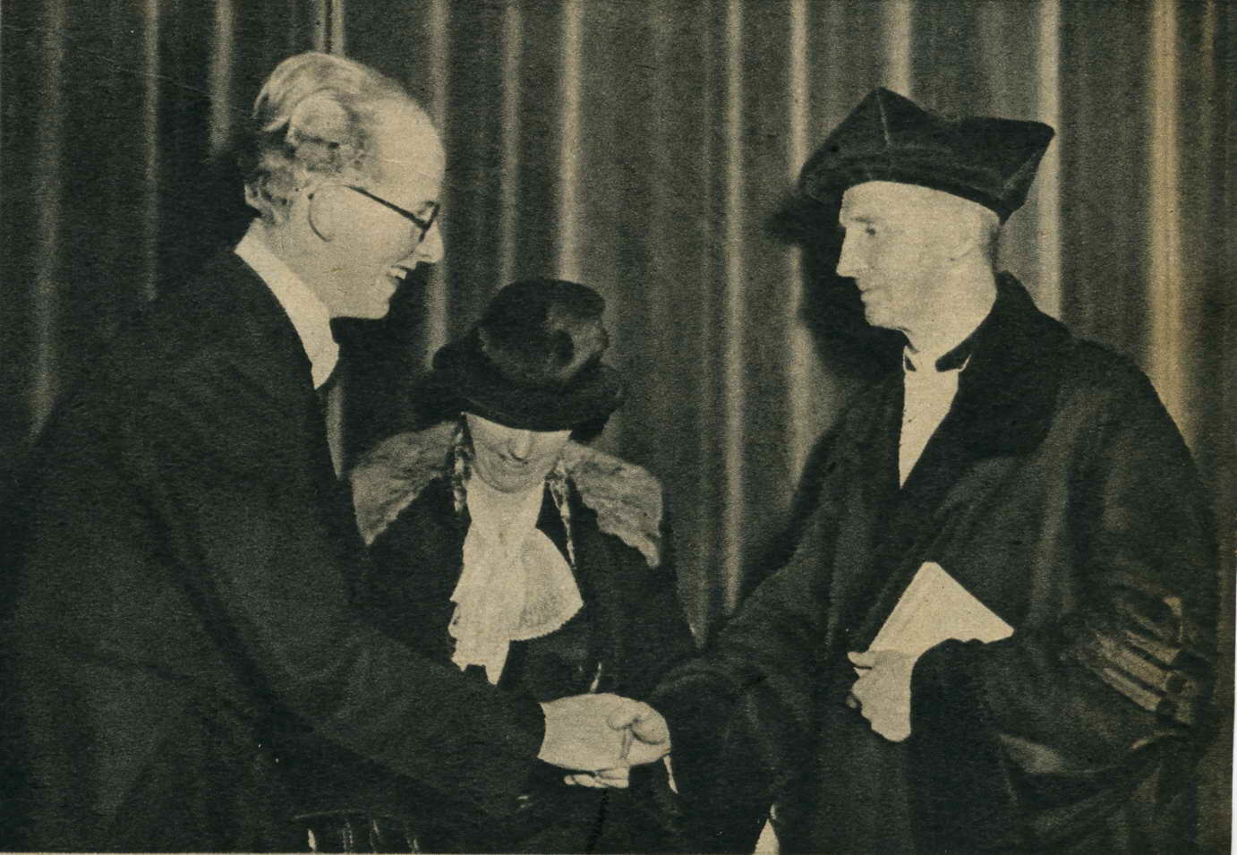 Bijschrift: "Op 28 februari 1940 werd Robert Hubert Willem Regout S.J. (Maastricht 18-01-1896 - Dachau 28-12-1942) benoemd tot buitengewoon hoogleraar Volkenrecht met het uitspreken van de inaugurale rede "Is er grond voor vertrouwen in de toekomst van het Volkenrecht". Op de foto ontvangt hij de felicitaties van de praeses van het studentencorps Carolus Magnus waarvan hij moderator was; in het midden zijn moeder" (uitgeknipte foto uit Katholieke Illustratie)